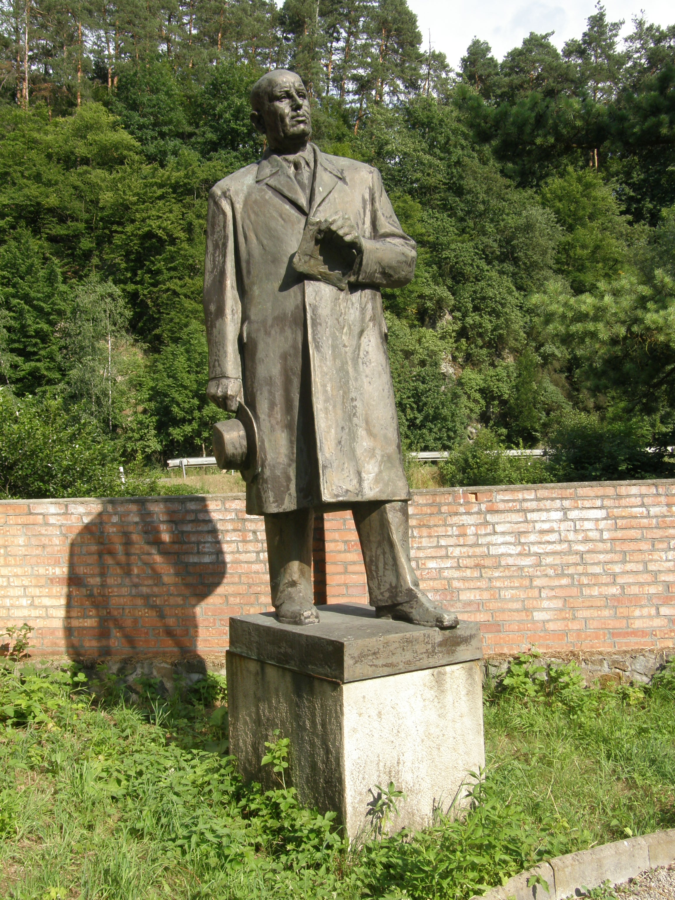 Socha Josefa Jurana u Klamovy huti u Blanska